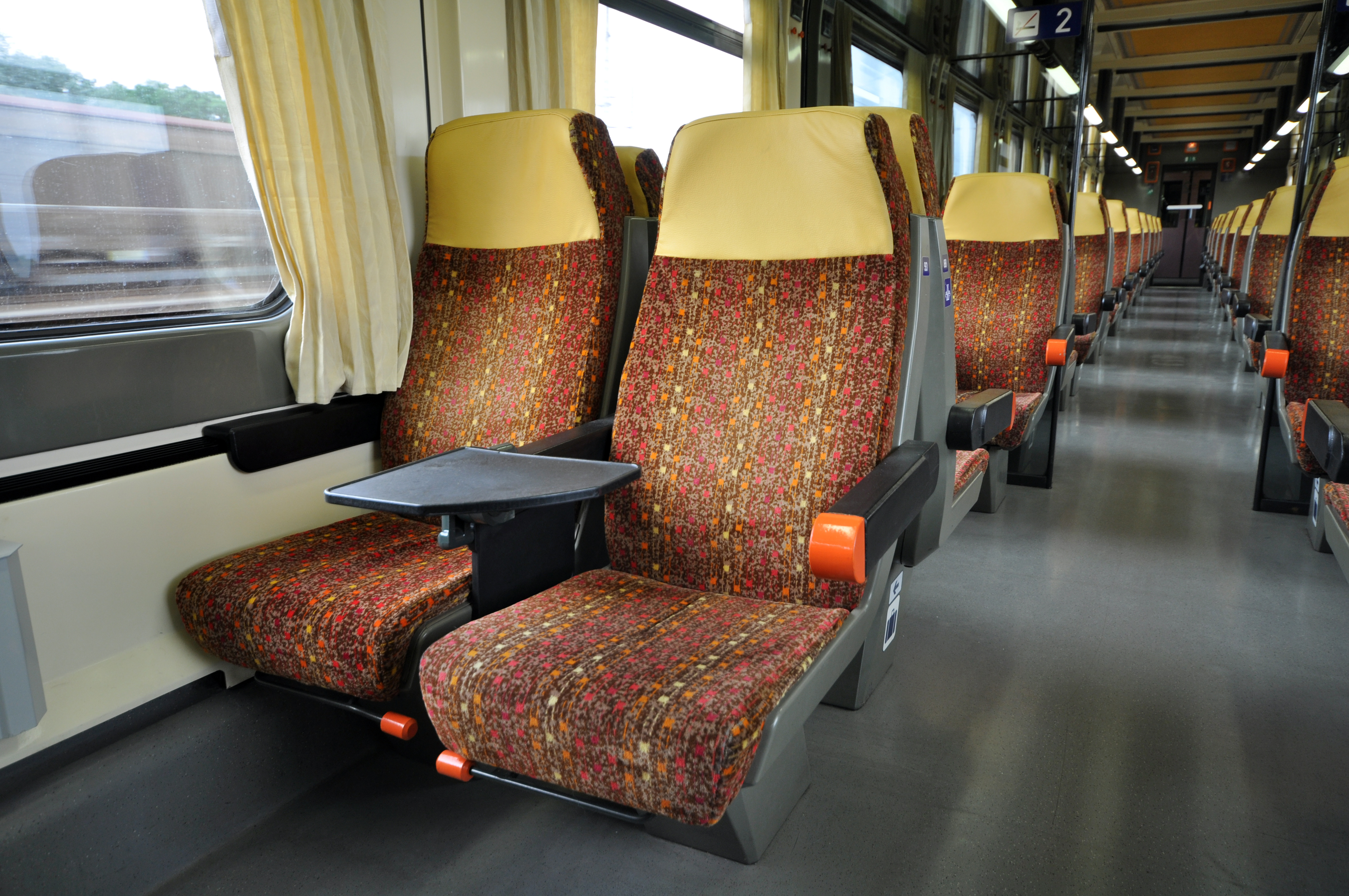 ICE- Waggon der Magyar Államvasutak